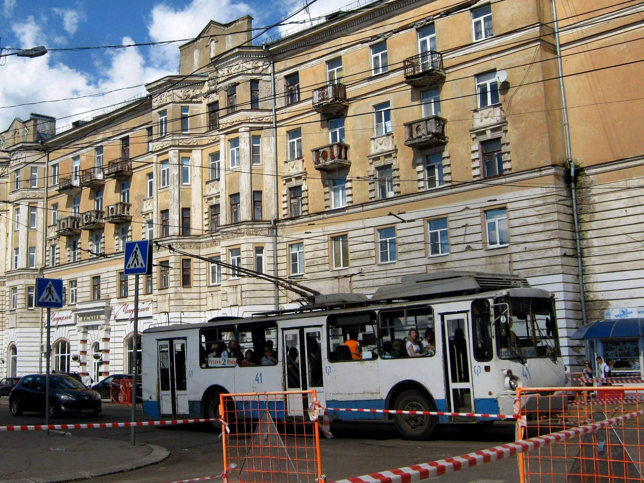 Троллейбус на Новоторжской улице (Тверь)